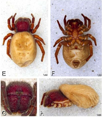 Loureedia annulipes (syn. Stegodyphus annulipes) female